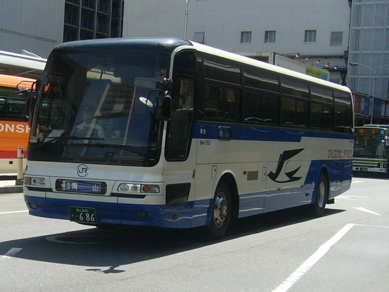 広島バスセンター(Hiroshima bus center)にて撮影 登録番号 岡山200か・686 中国ジェイアールバス(Chugoku JR bus)岡山支店所所属 サンサンライナー号用